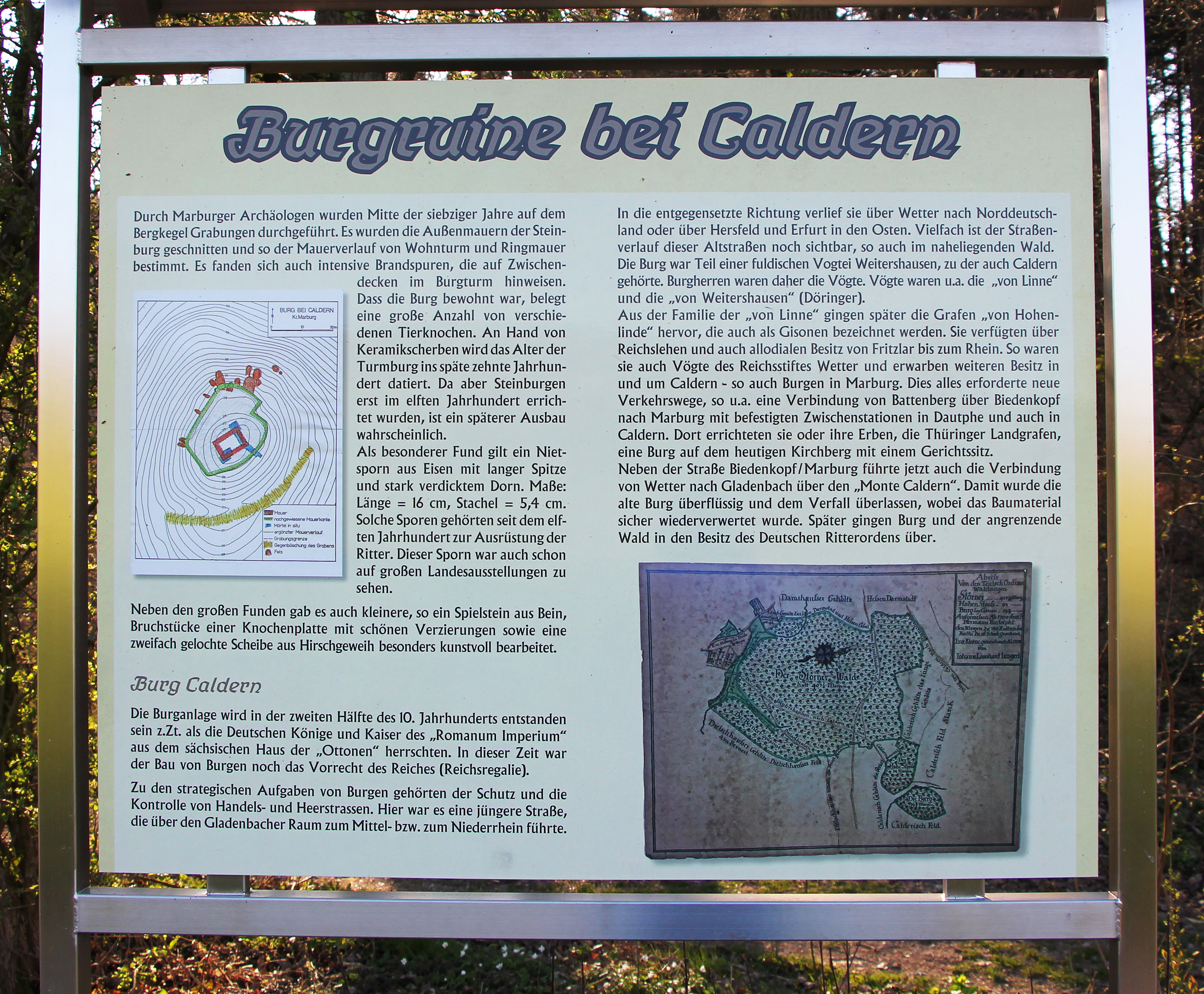 Infotafel zur Burgruine bei Caldern, Lahntal, Landkreis Marburg-Biedenkopf.